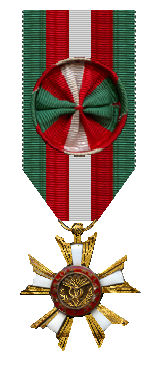 Natinale Orde van Madagascar, officierskruis